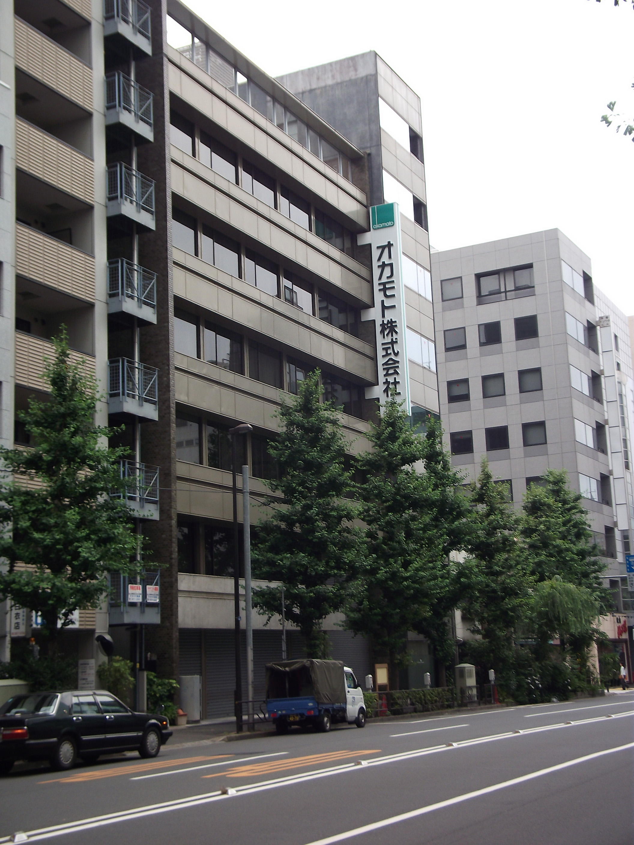 オカモト本社（東京都文京区本郷）。